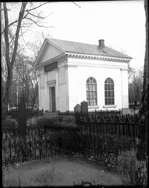 Enneska gravkoret. Kategori: (01) Exteriörer, detaljer Enneska gravkoret.